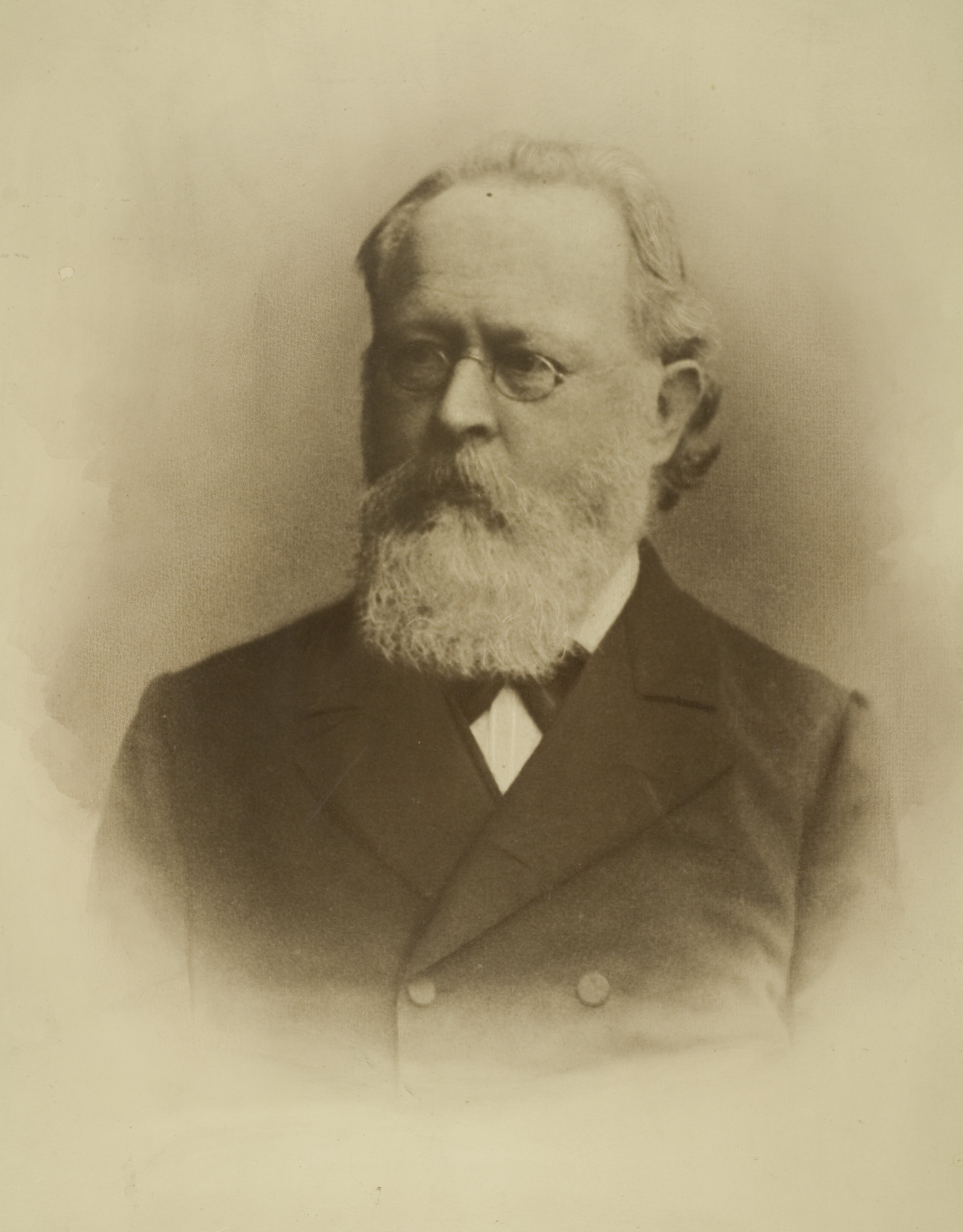 Julius Arnold, Pathologe, 1866–1907 Professor in Heidelberg, erster Lehrstuhlinhaber des 1866 gegründeten pathologischen Institutes der Universität Heidelberg